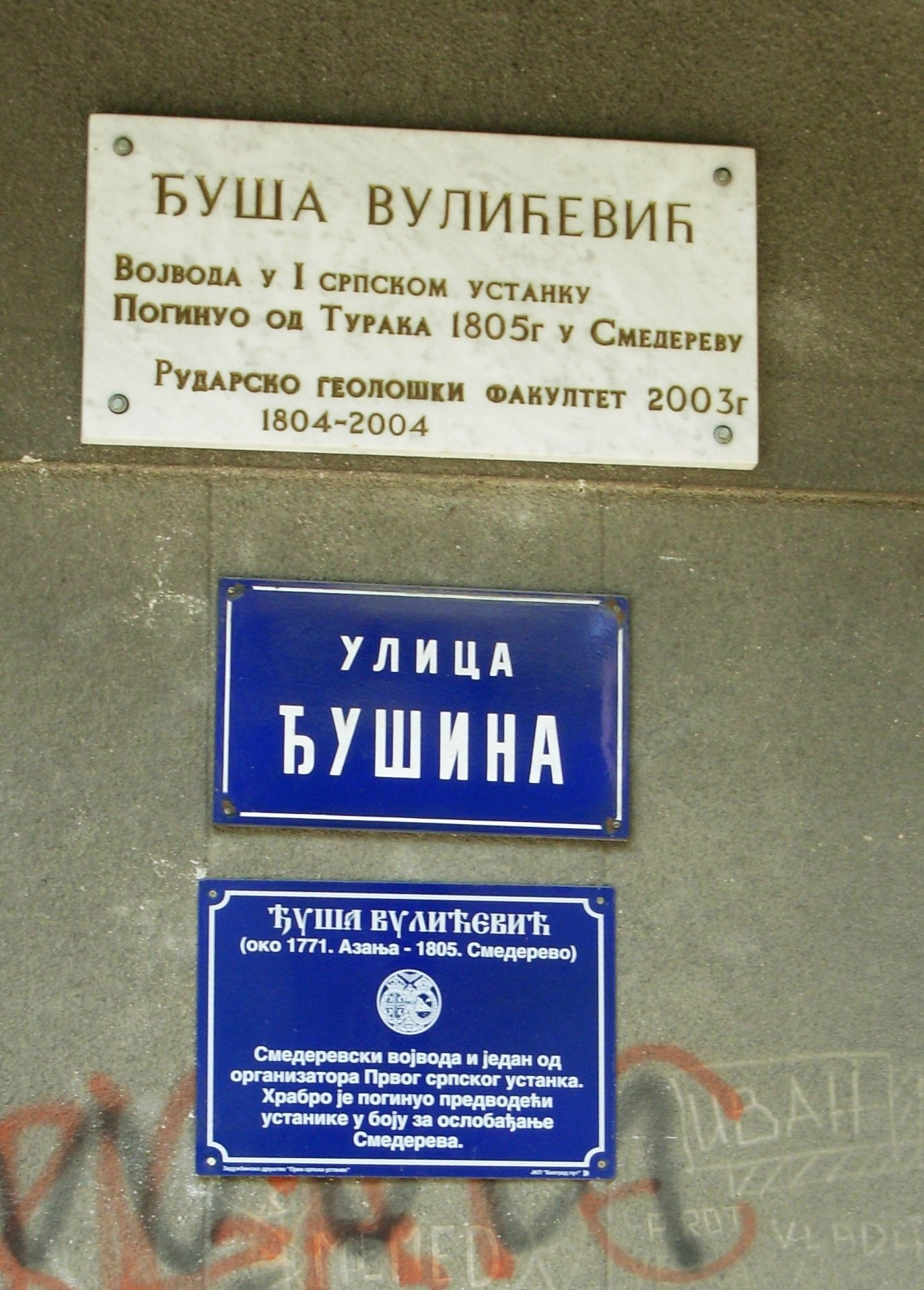 Đušina ulica. Slikao Goldfinger